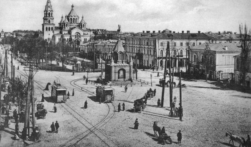 Соборний майдан у Житомирі, ХІХ ст.. На задньому плані Кафедральний собор